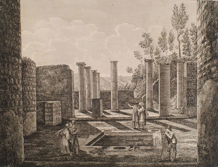 Luigi Rossini (1790–1857): Pompei, Casa di Giuseppe II, benannt nach Kaiser Joseph II. (1741–1790), der Pompei am 7. April 1769 besichtigte. Ätzradierung (Acquaforte), 39,5 x 42,0 cm, Rom 1830.